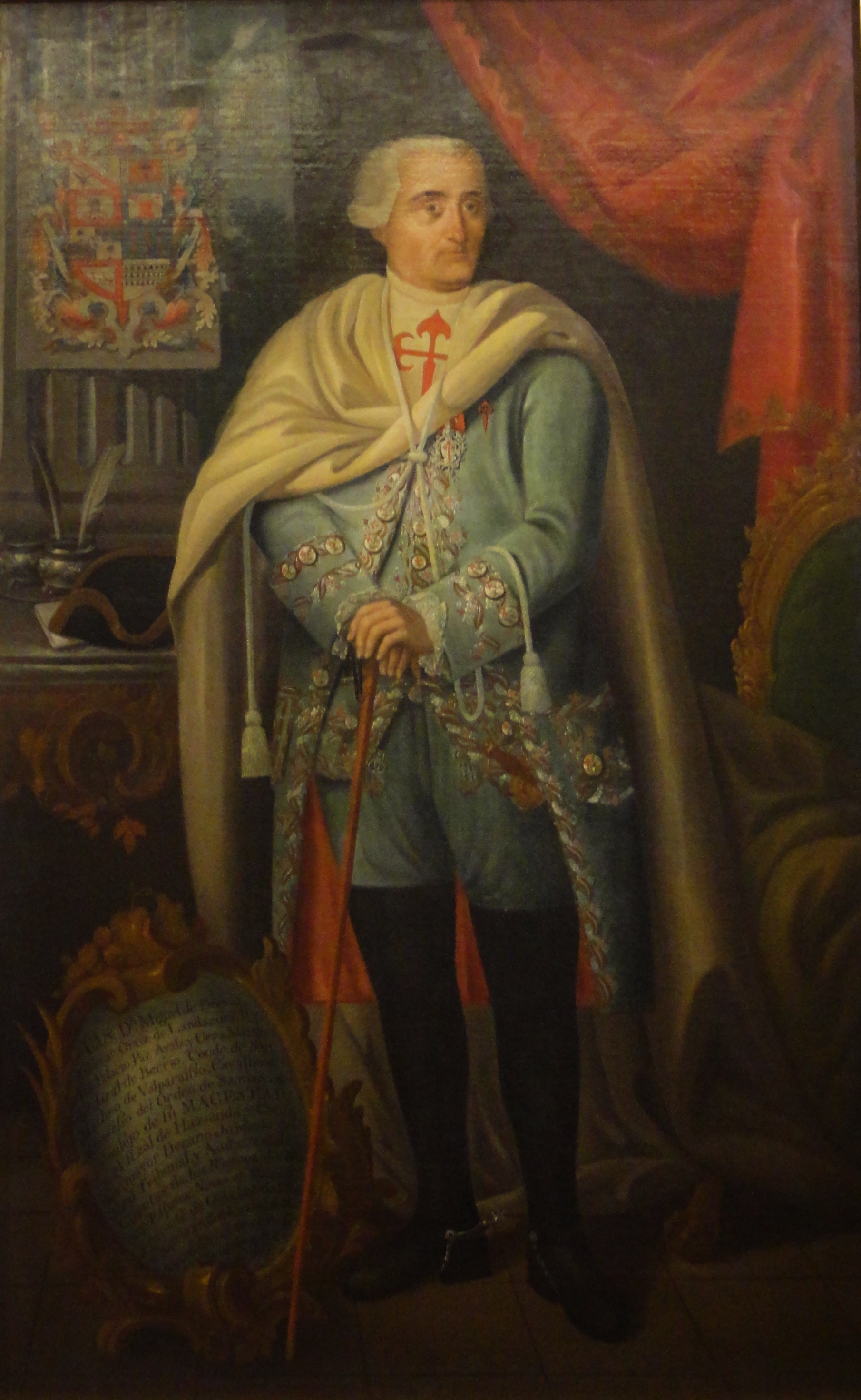 Don MIguel de Berrio y Zaldívar. Primer Marqués del Jaral de Berrio, s. XVIII - Anónimo